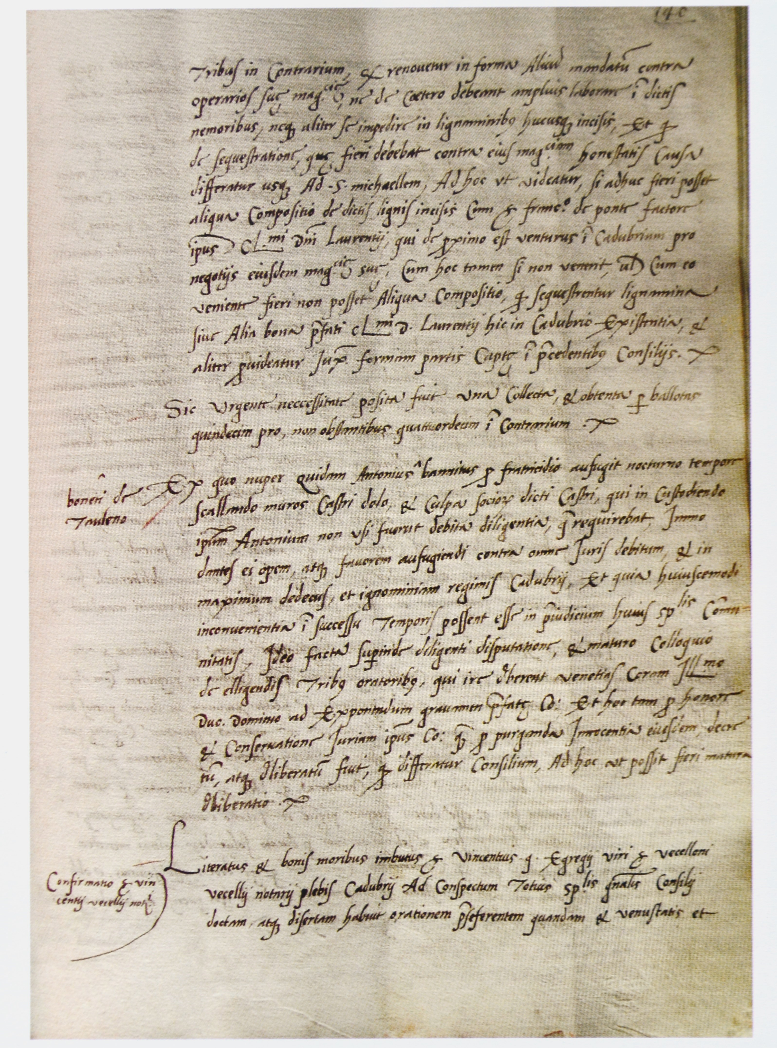 Autorizzazione della Magnifica Comunità di Pieve di Cadore all'esercizio del notariato per Vincenzo Vecellio, creato notaio dal cugino Tiziano